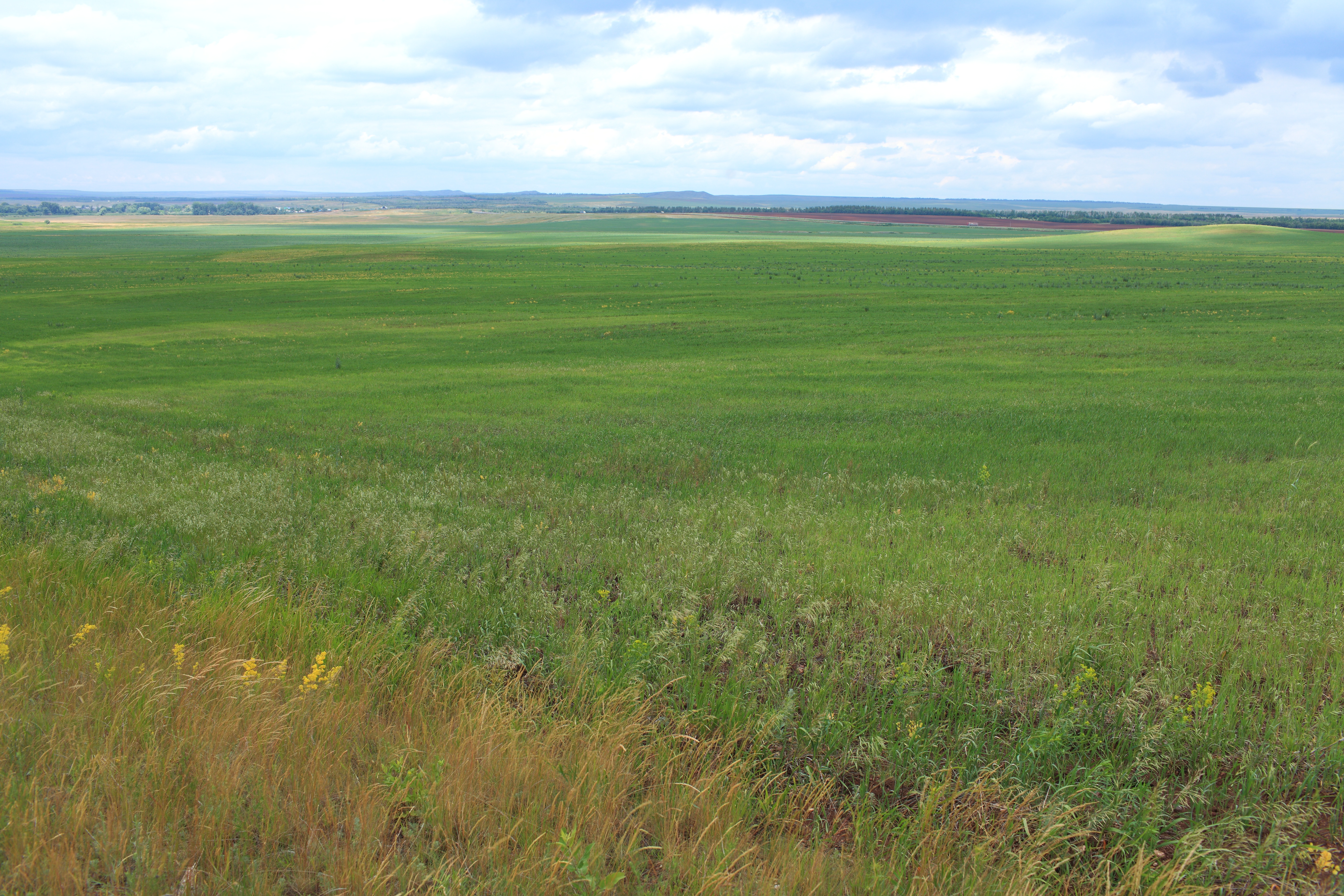 Бескрайние поля